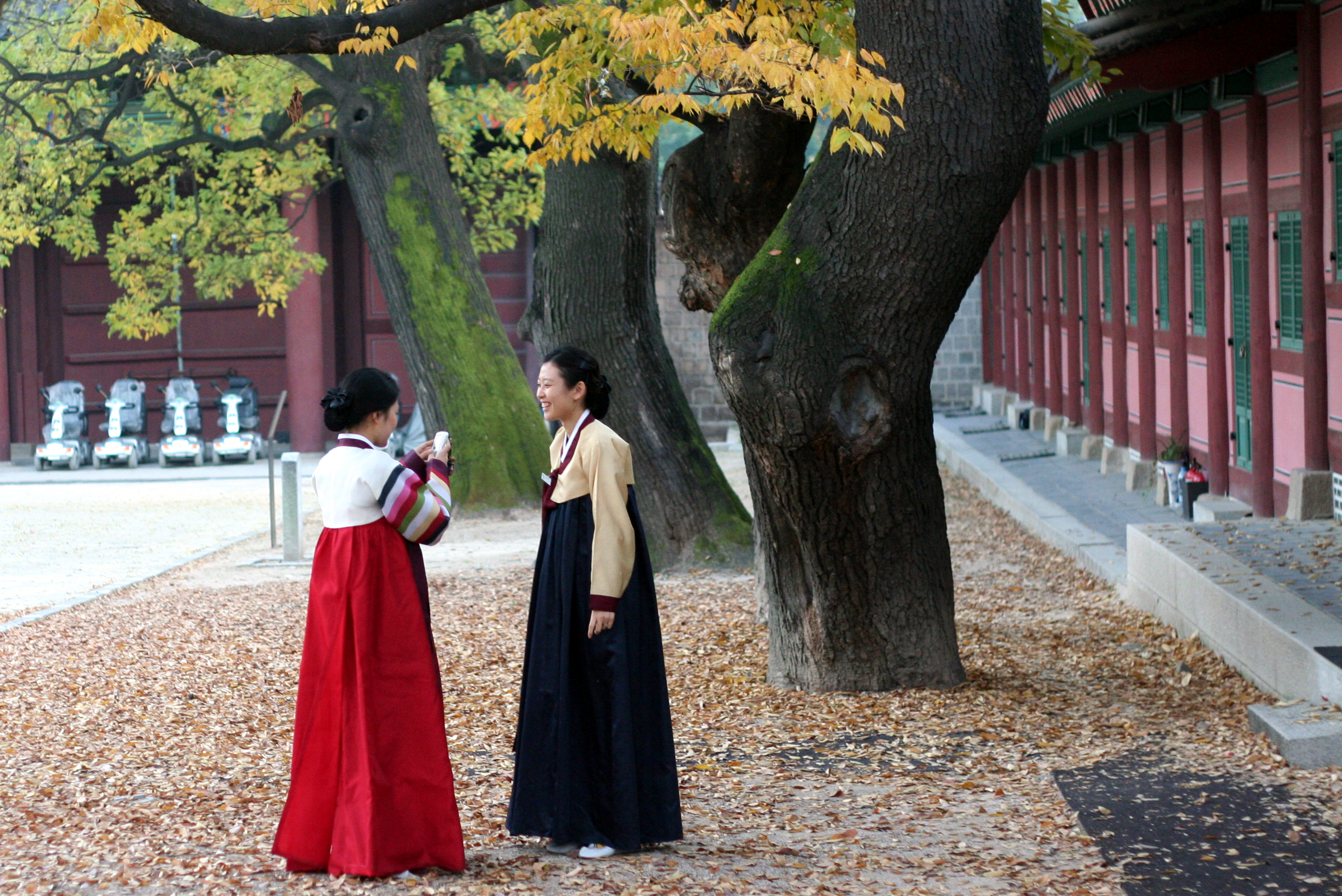 Korea-Seoul-Changdeokgung-Hanbok